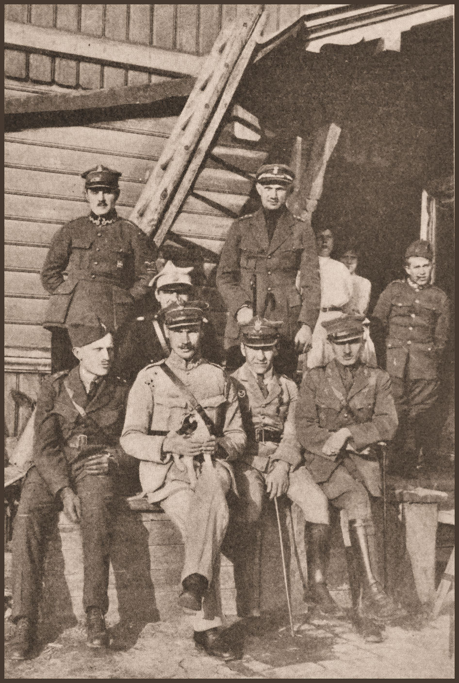 Personel 4 Eskadry Wywiadowczej w maju 1920 roku.